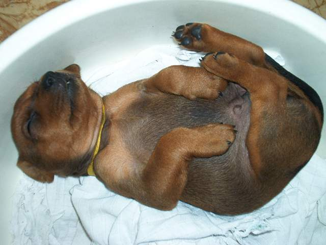 Deutscher Pinscher Bibiana z Cyklonu Silesia - Bosorka